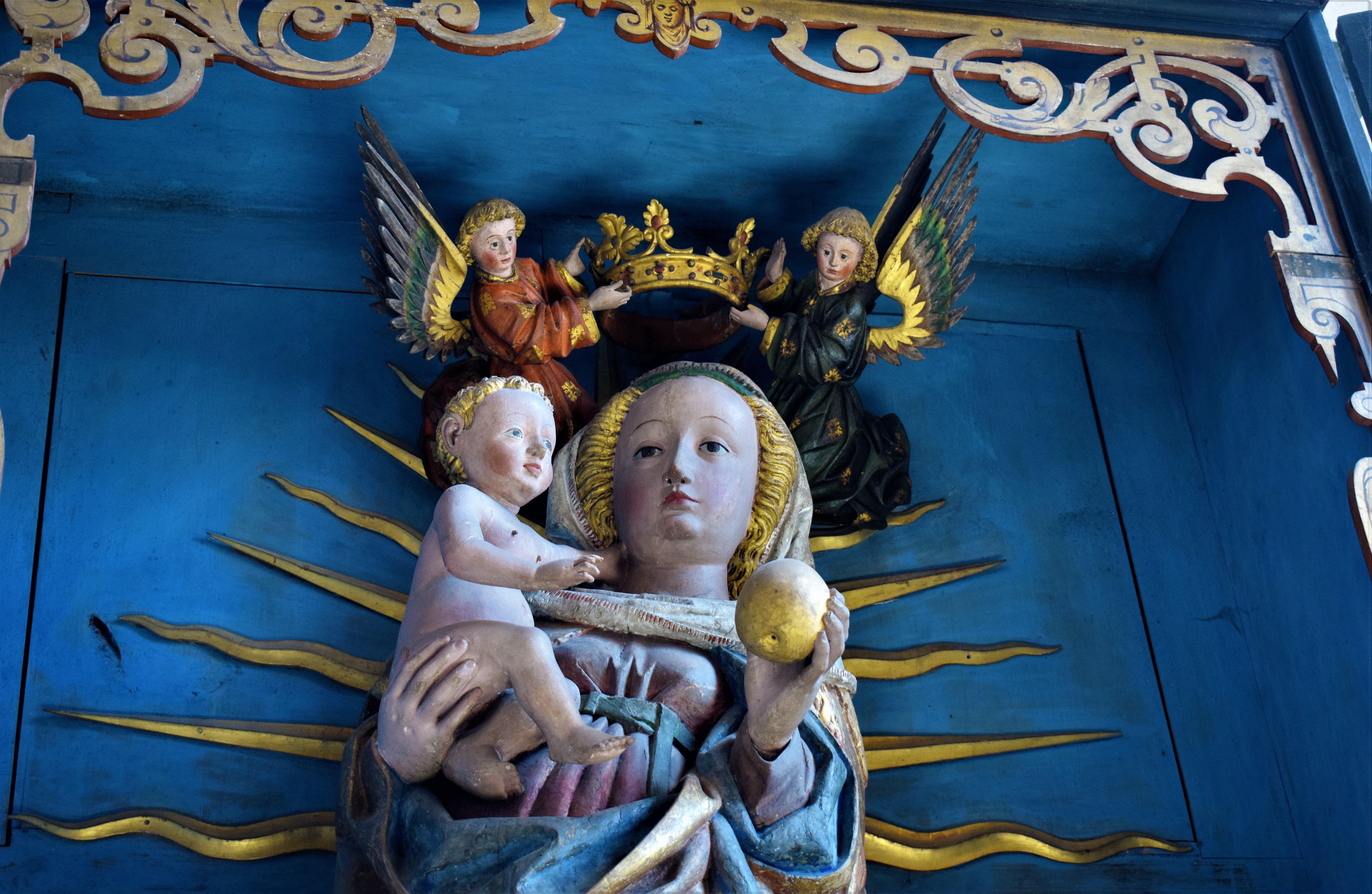 Rieterkirche Kalbensteinberg, Mondsichelmadonna mit Kind (um 1470) im Hochaltar (Detail)